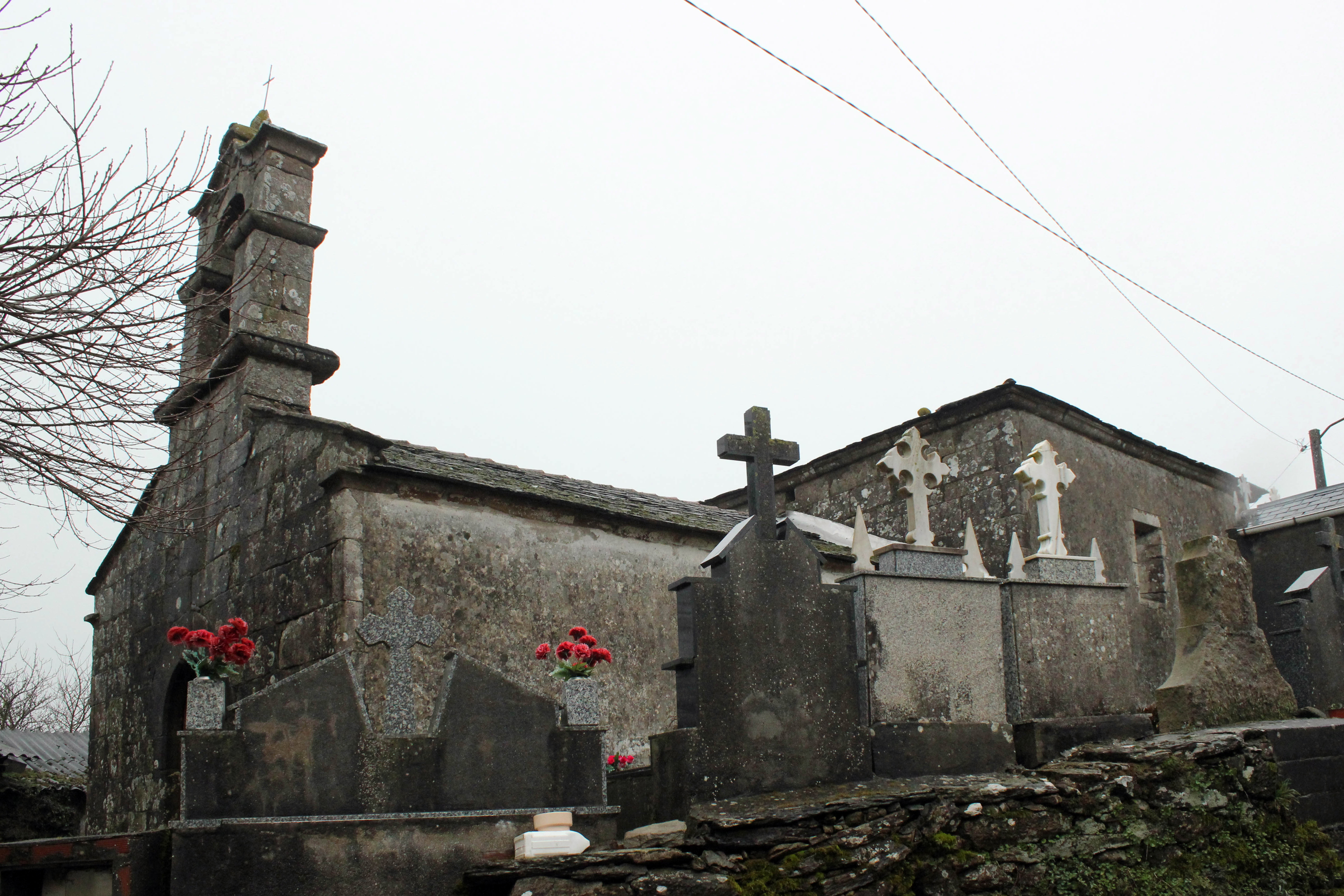 Igrexa de Santa María de Salgueiros, no concello de Monterroso.